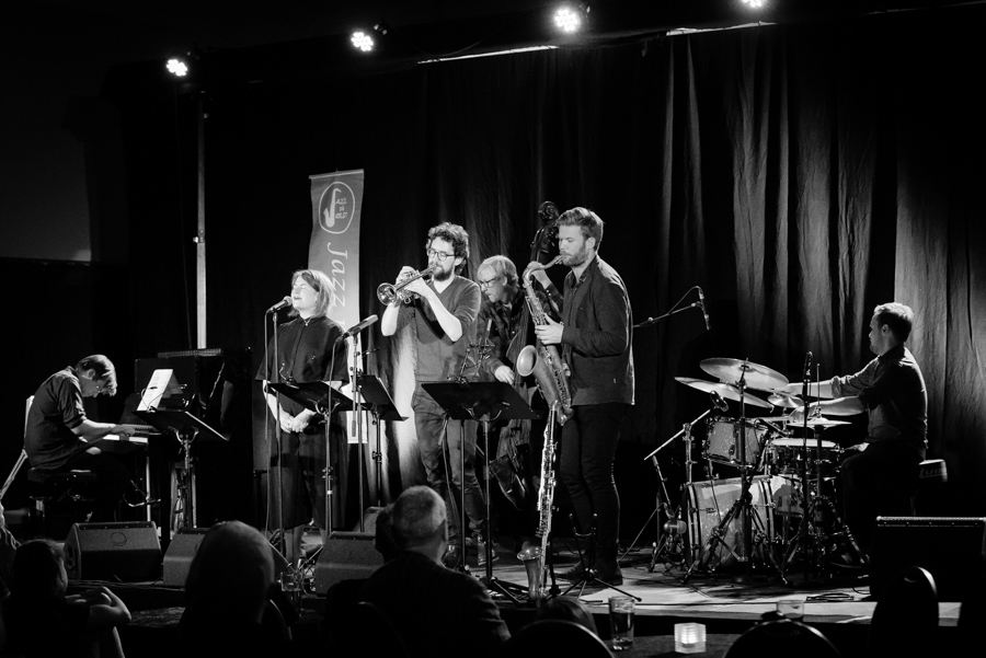 Avbillda : Arrangement: Significant TimeHøve / arrangør / stad : Jazz på Jølst 2017 / Skei